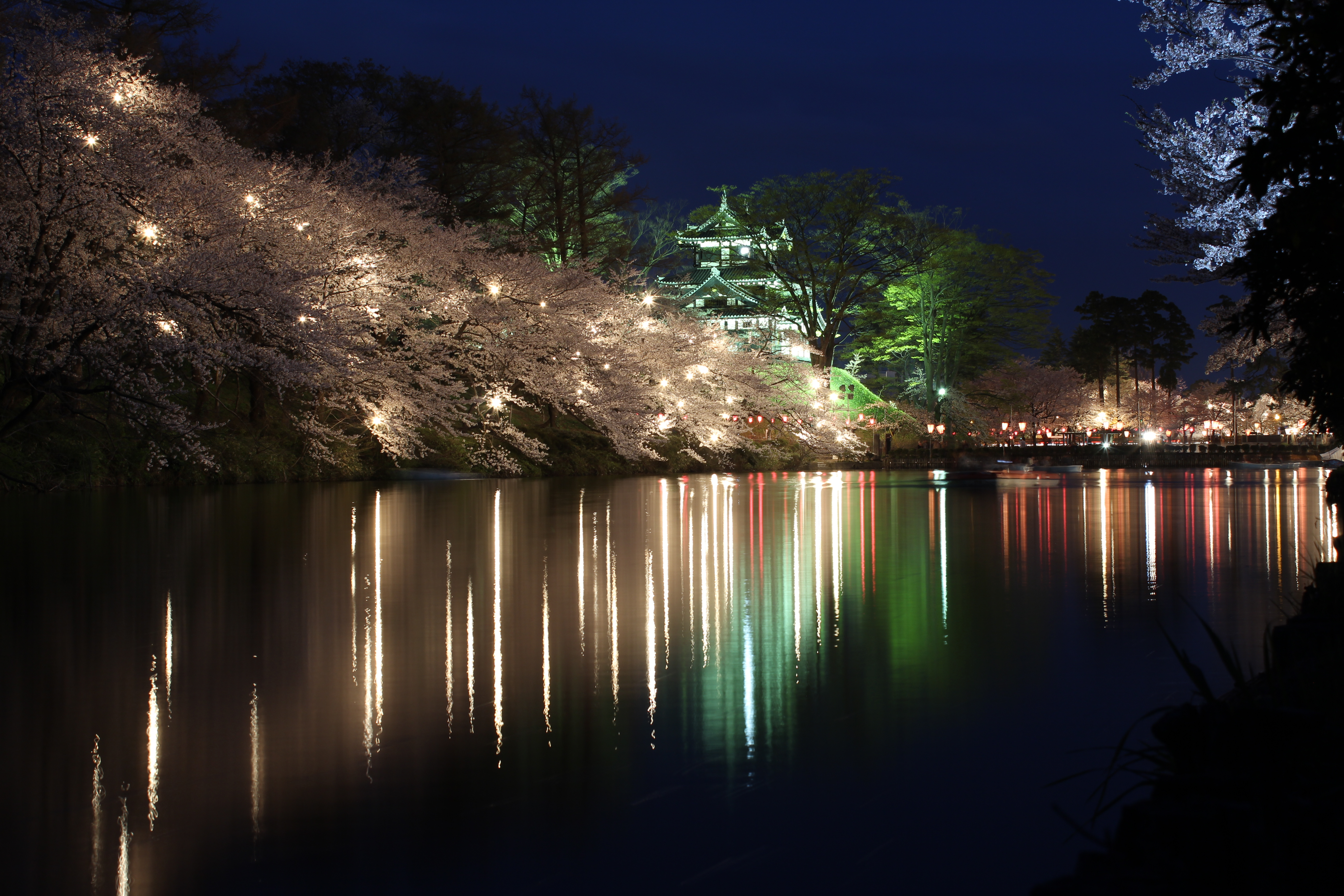 高田城三重櫓観桜会ライトアップ